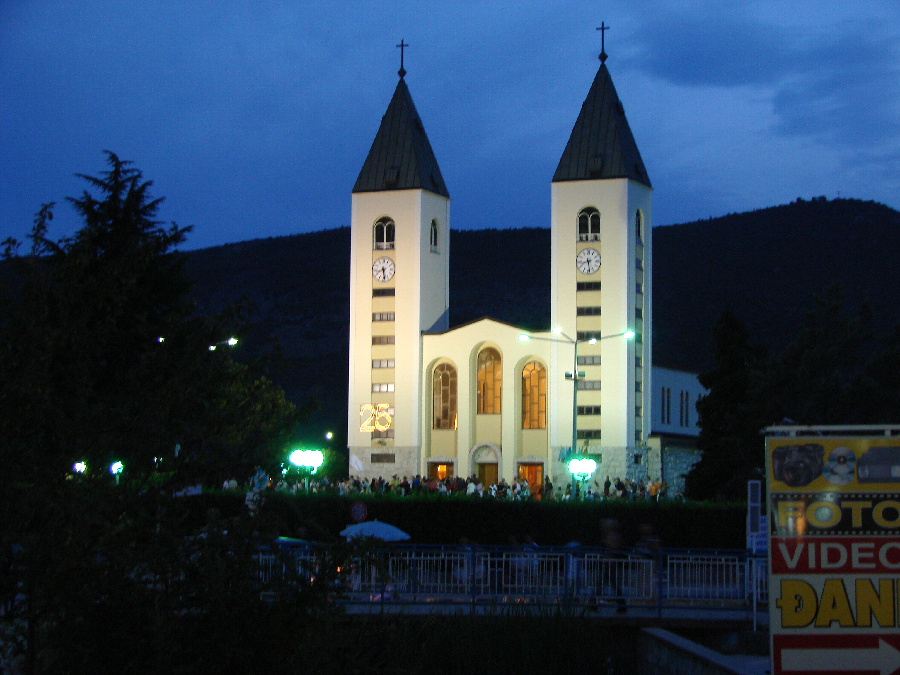 Miejscowość w Bośni i Hercegowinie położona w południowej części Hercegowiny na południowy zachód od Mostaru.